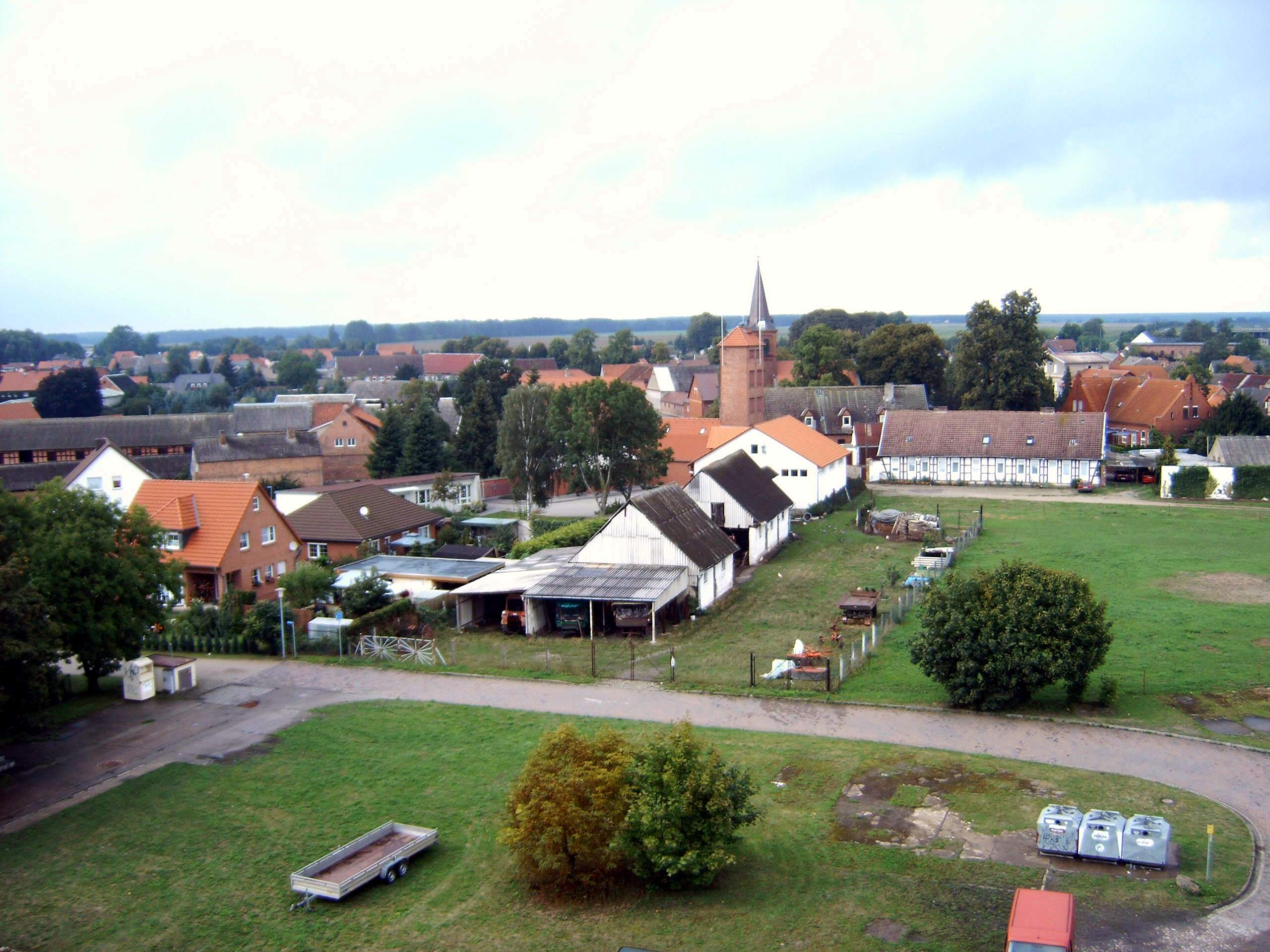 Blick auf Kunrau (Sachsen-Anhalt, Deutschland) vom Schlossturm Bild aufgenommen am 26.8.2006 von Olaf Meister